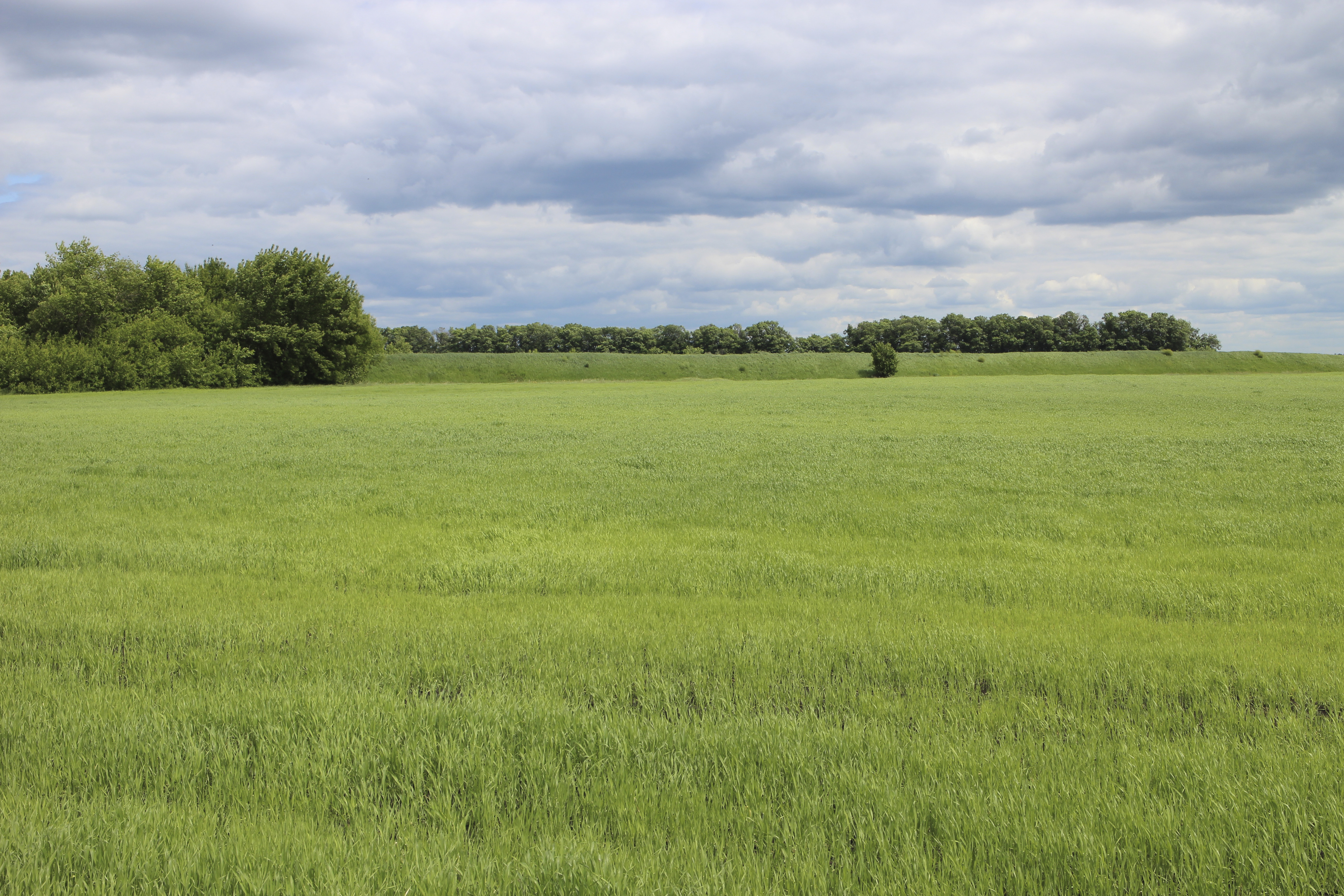 Татарский вал (продолжение): Покрово-Пригородное, Тамбовский район, Тамбовская область This image is related to the protected area of Russia number 6810091